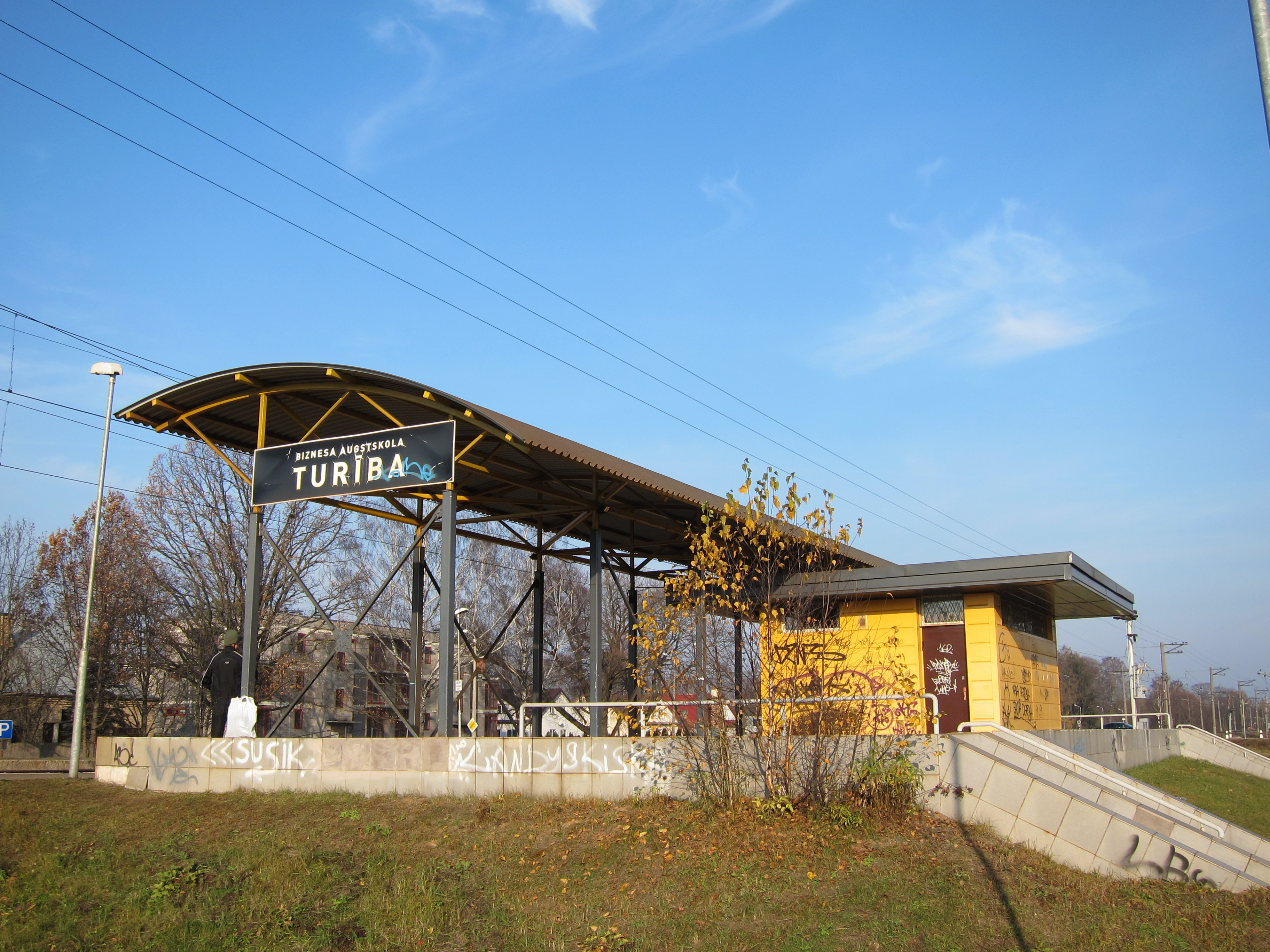 Turības stacijas ēka